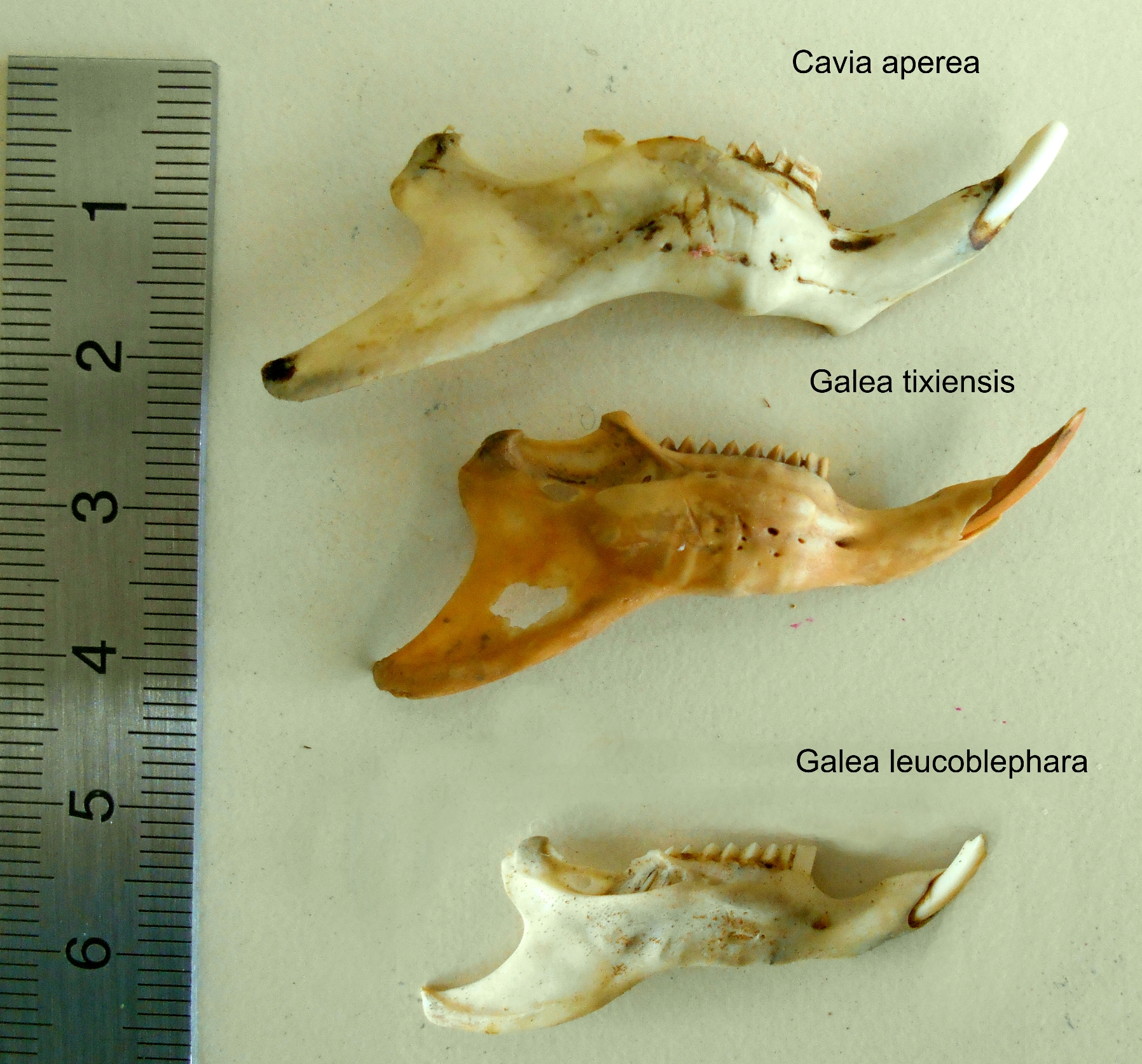 Rama mandibular de Galea tixiensis comparada con otras dos especies de roedores cávidos.